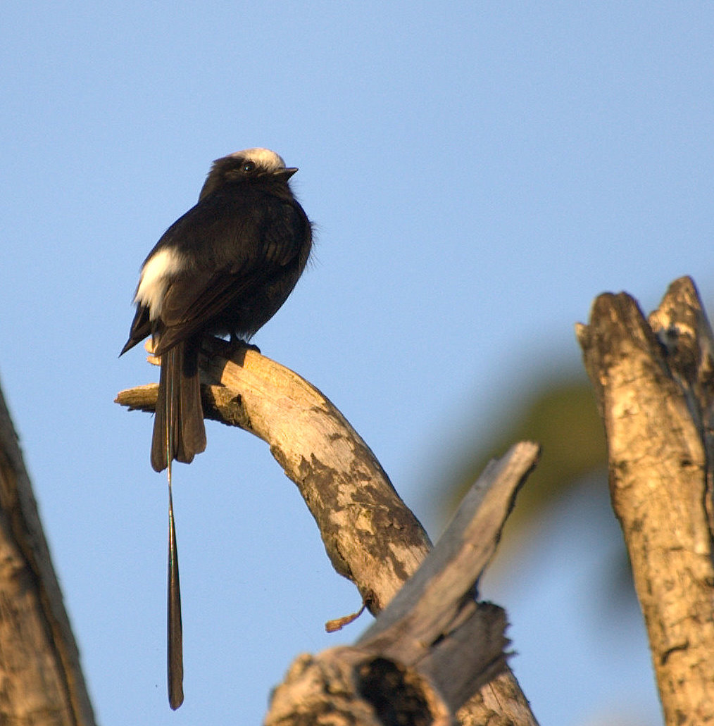 Rodovia Empei Hiraide SP-139, próximo à cidade de Registro-SP